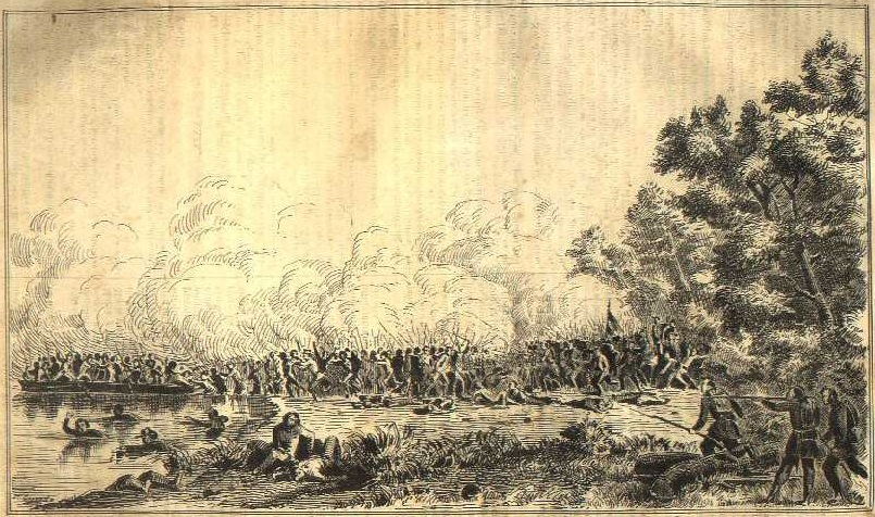 Combate del 31 de enero en el Paso de la Patria. Carga a la bayoneta.